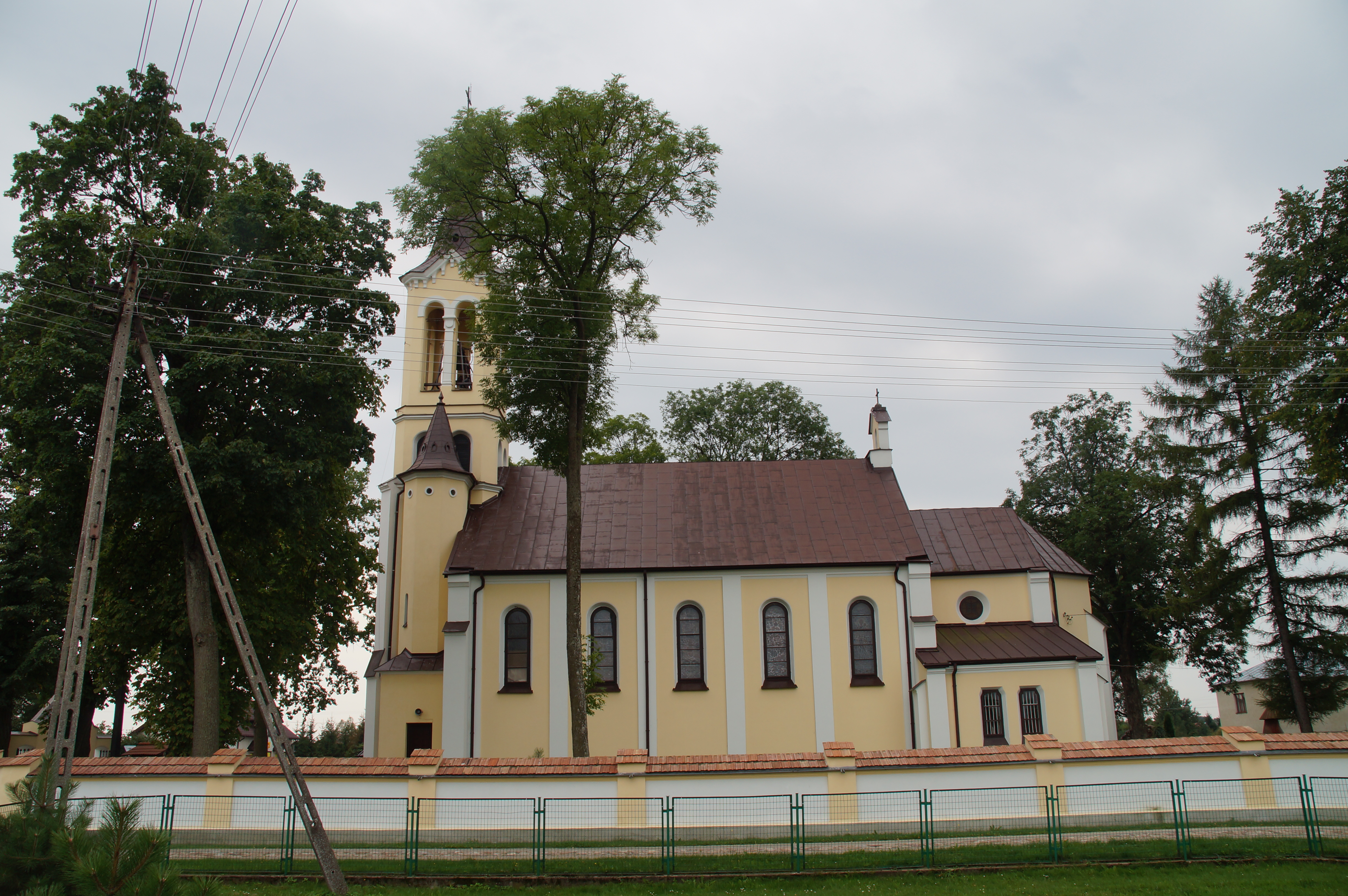 Tuczna - zespół kościoła parafialnego p.w. św. Anny (zabytek nr rejestr. A/423 z 20.10.1998)